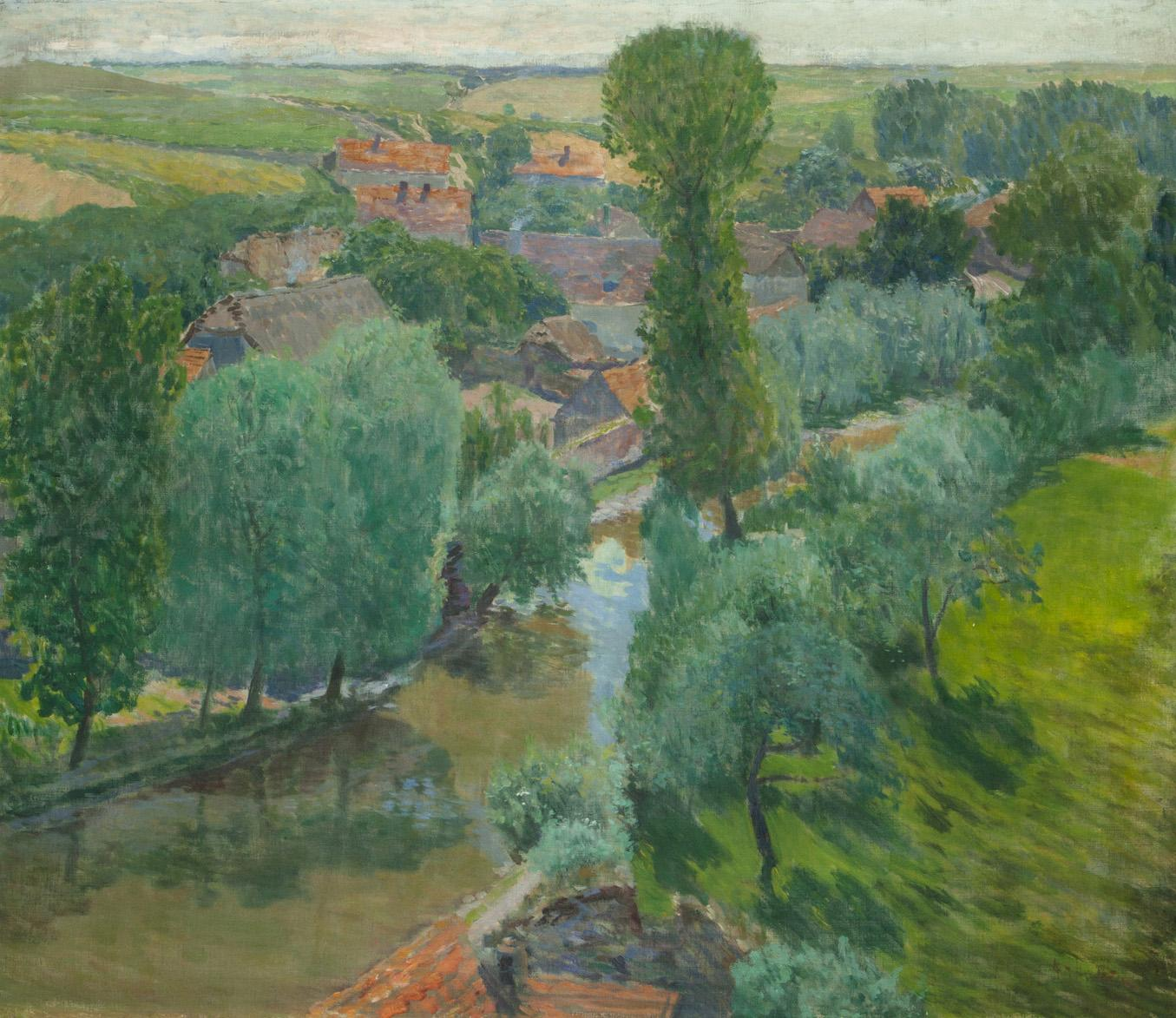 Pohled na Okoř